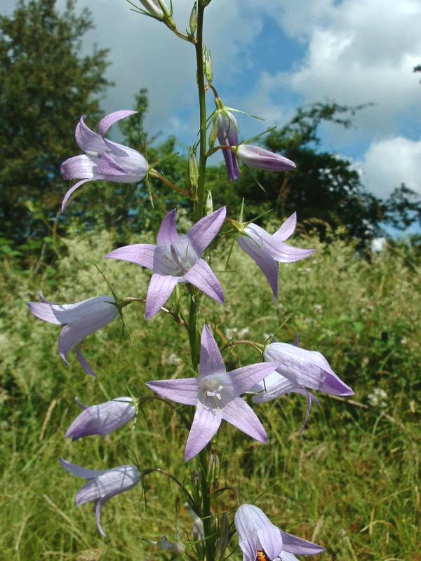 Campanula rapunculus, Campanulaceae